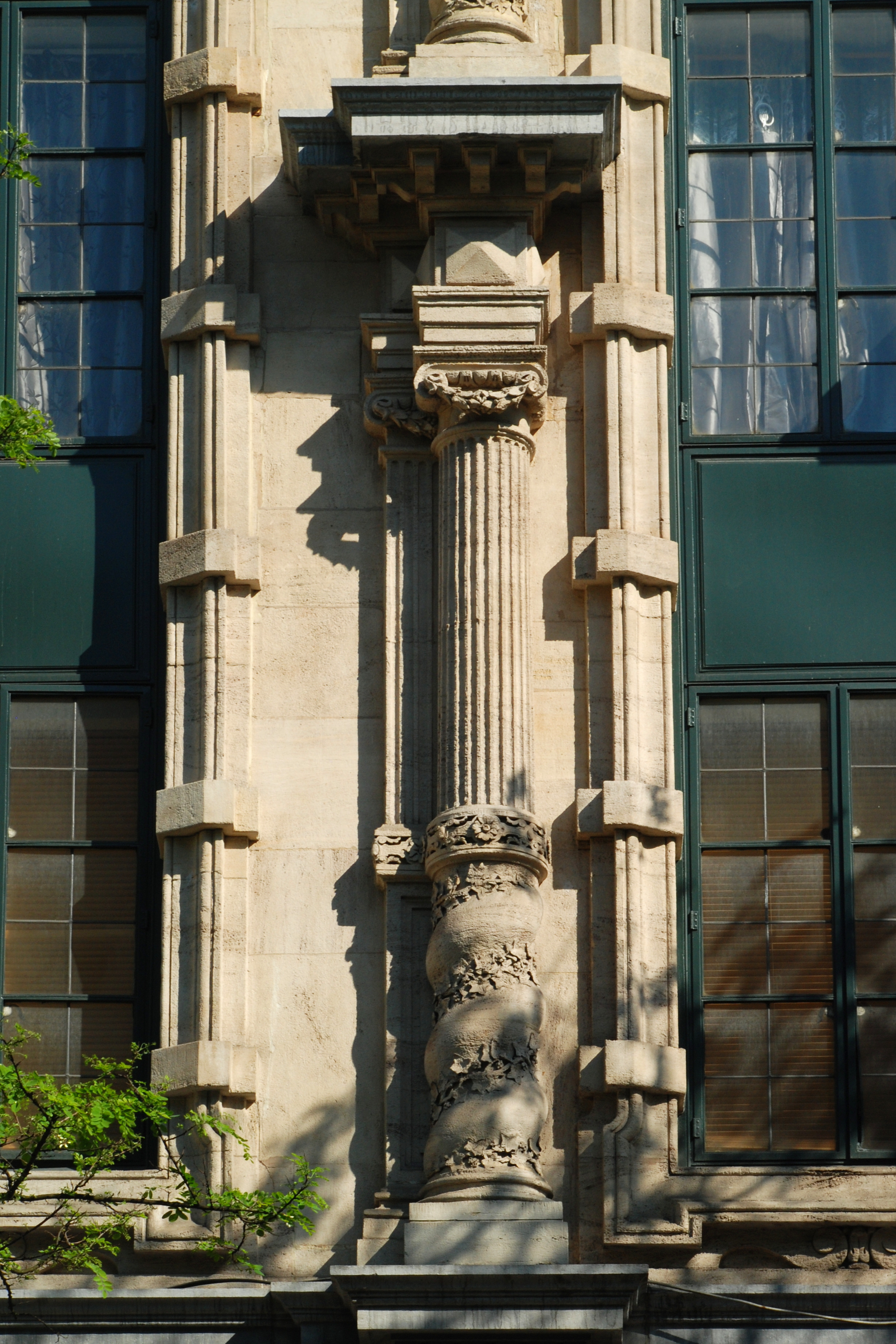 Belgique - Bruxelles - Maison presbytérale de l'église Notre-Dame du Finistère